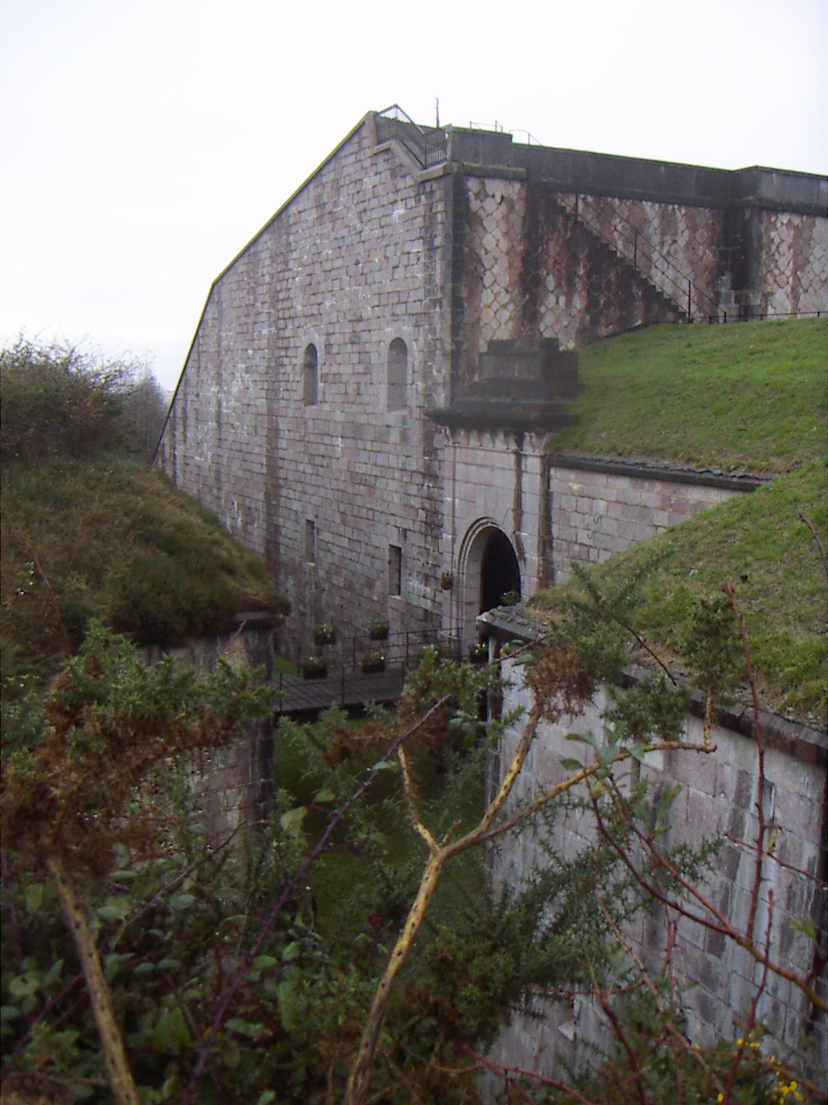 Fortress of San Marcos (Renteria / Saint Sebastien)